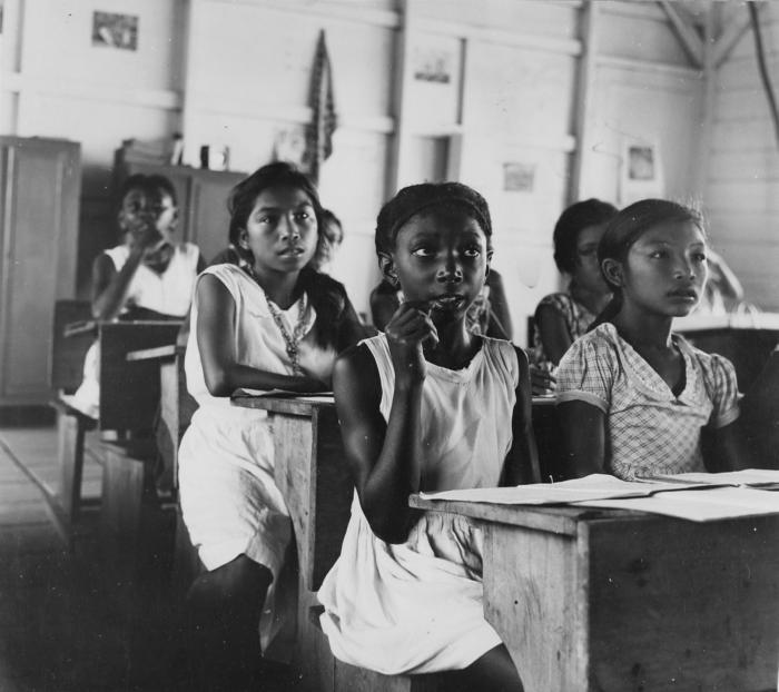 Negatief. Een schoolklas in Bigiston